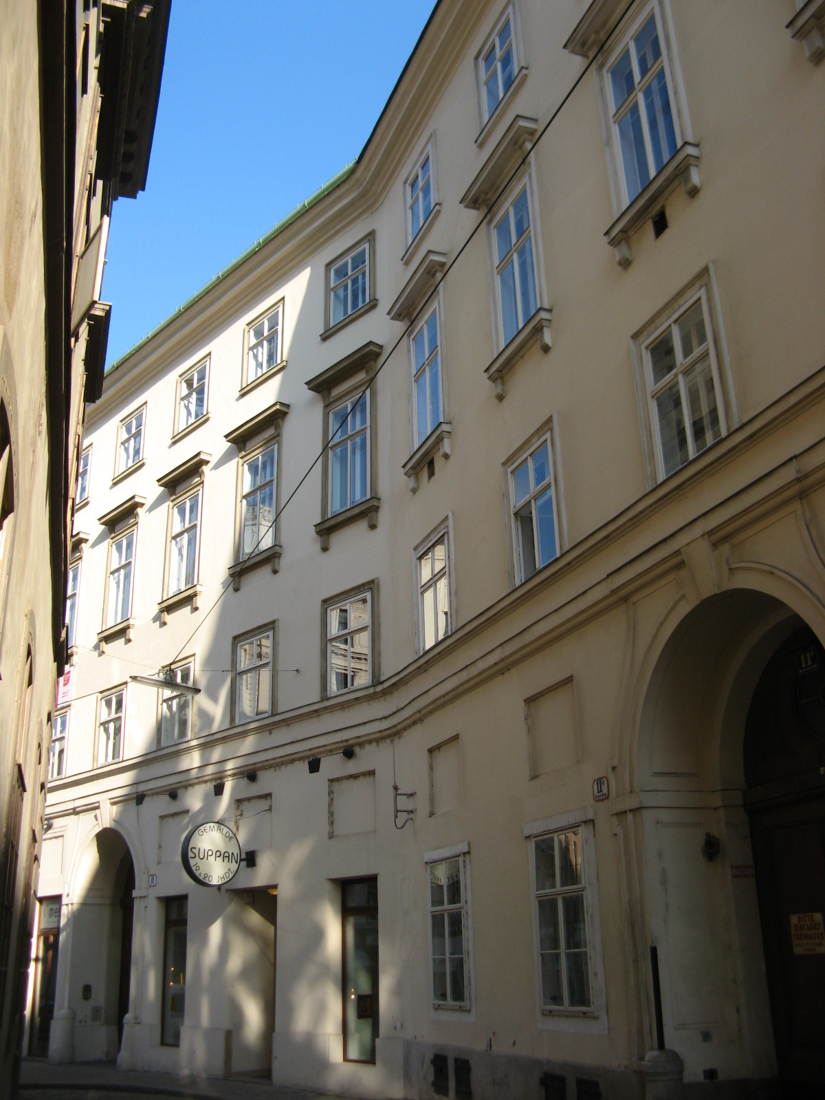 Bräunerstraße von der Augustinerstraße nach Norden, Wien-Innere Stadt